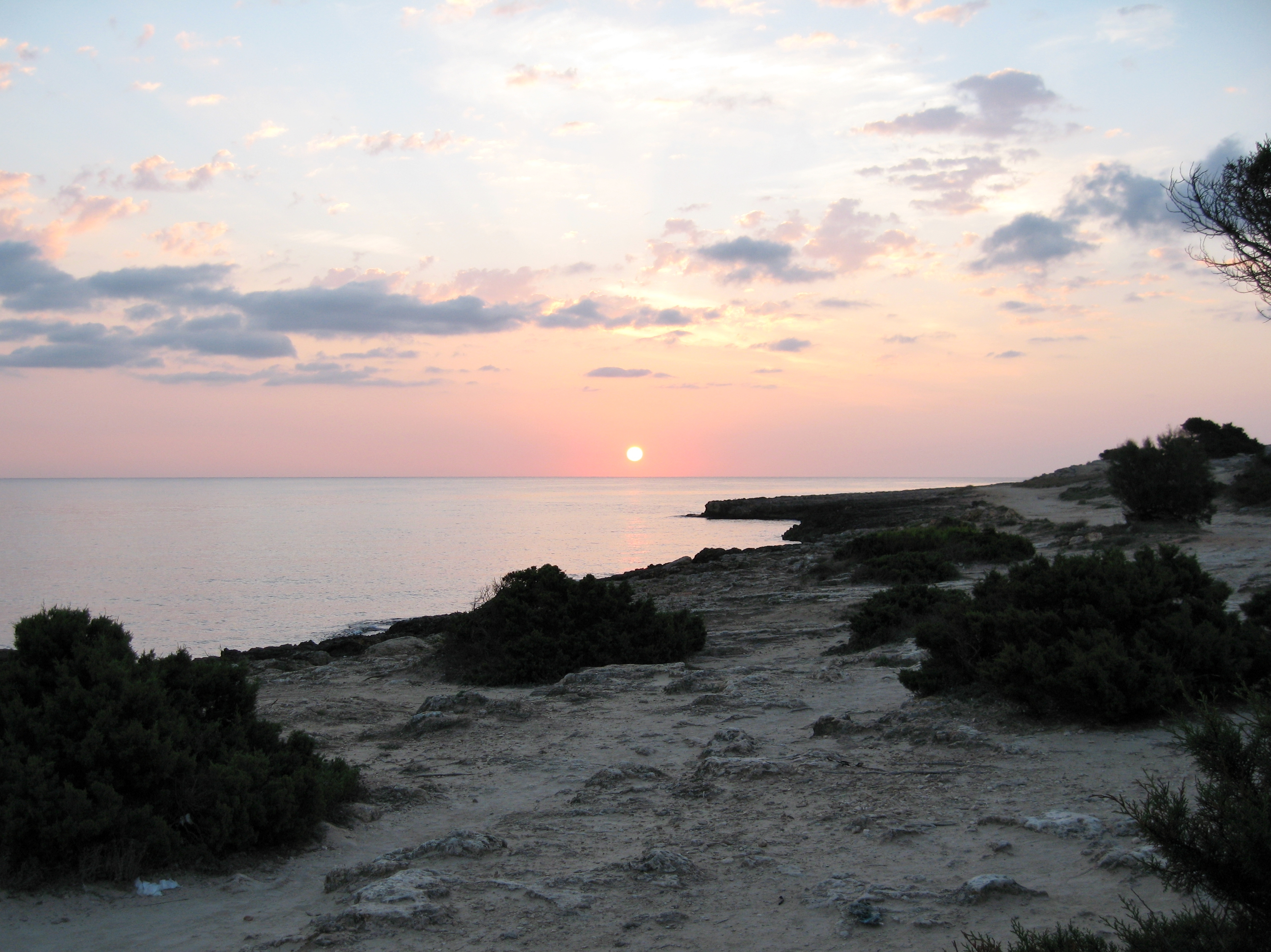 Punta de n'Amer, Sant Llorenç des Cardassar, Mallorca, Spain